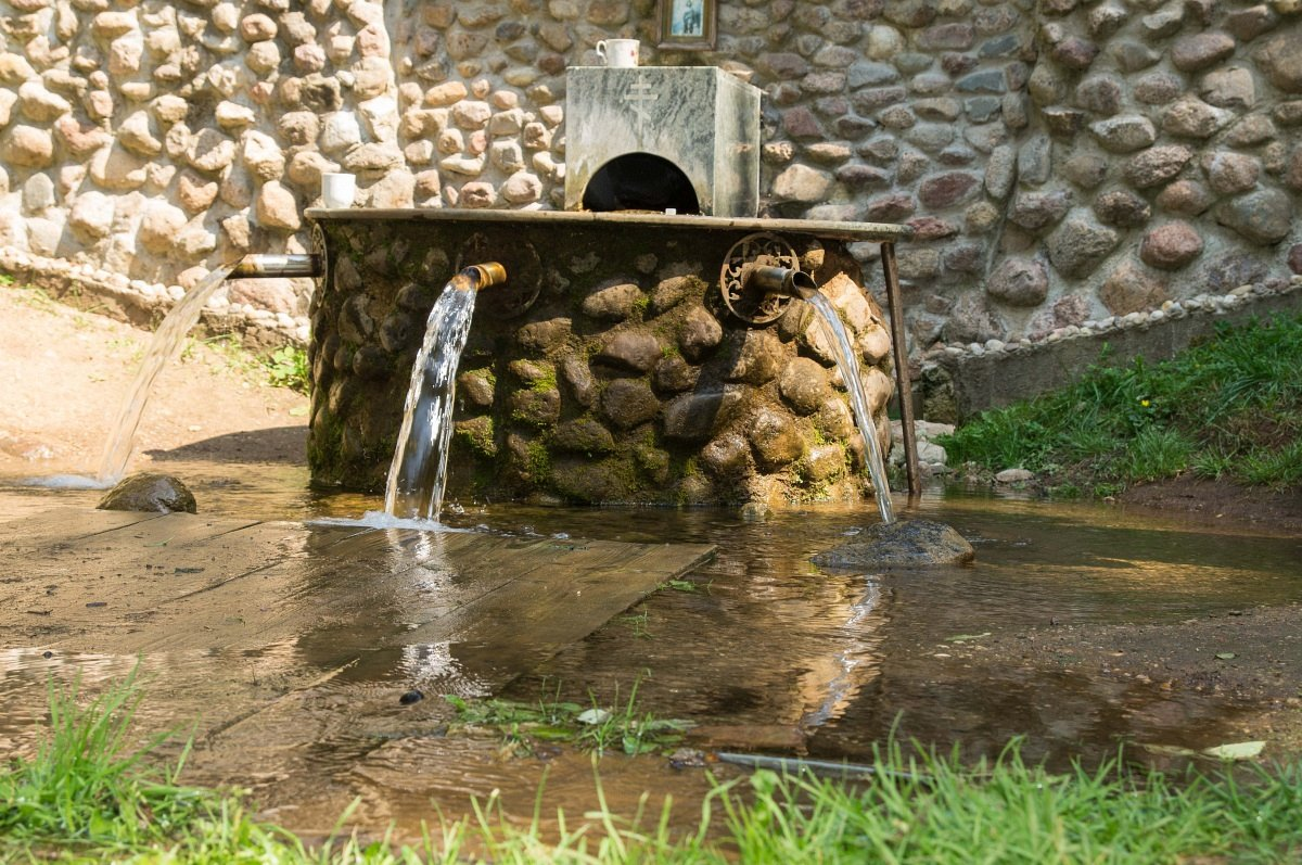 Чарневічы. Крыніца Св. Іаана Хрысціцеля